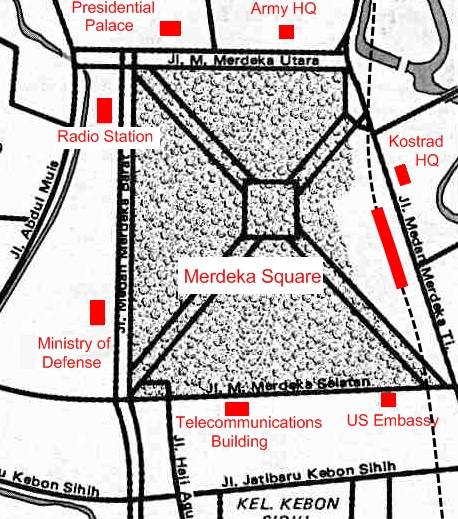 Merdeka Square, Jakarta as on 30 September 1965